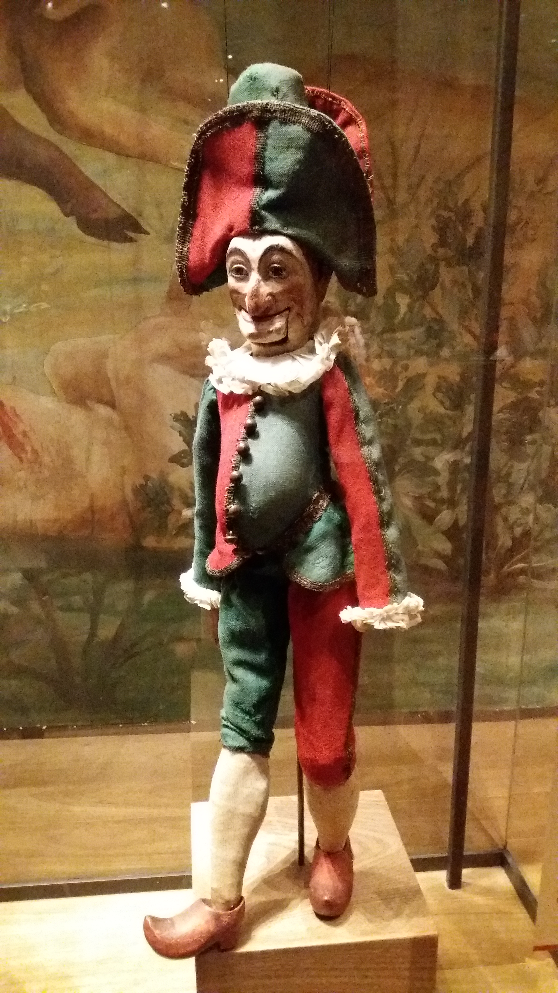 Marionnette à fil de Polichinelle, théatre Séraphin au Palais Royal (Paris), vers 1797. Par Séraphin-Dominique François (1747-1800). Inventaire : D.A.T.P.56.1.889.